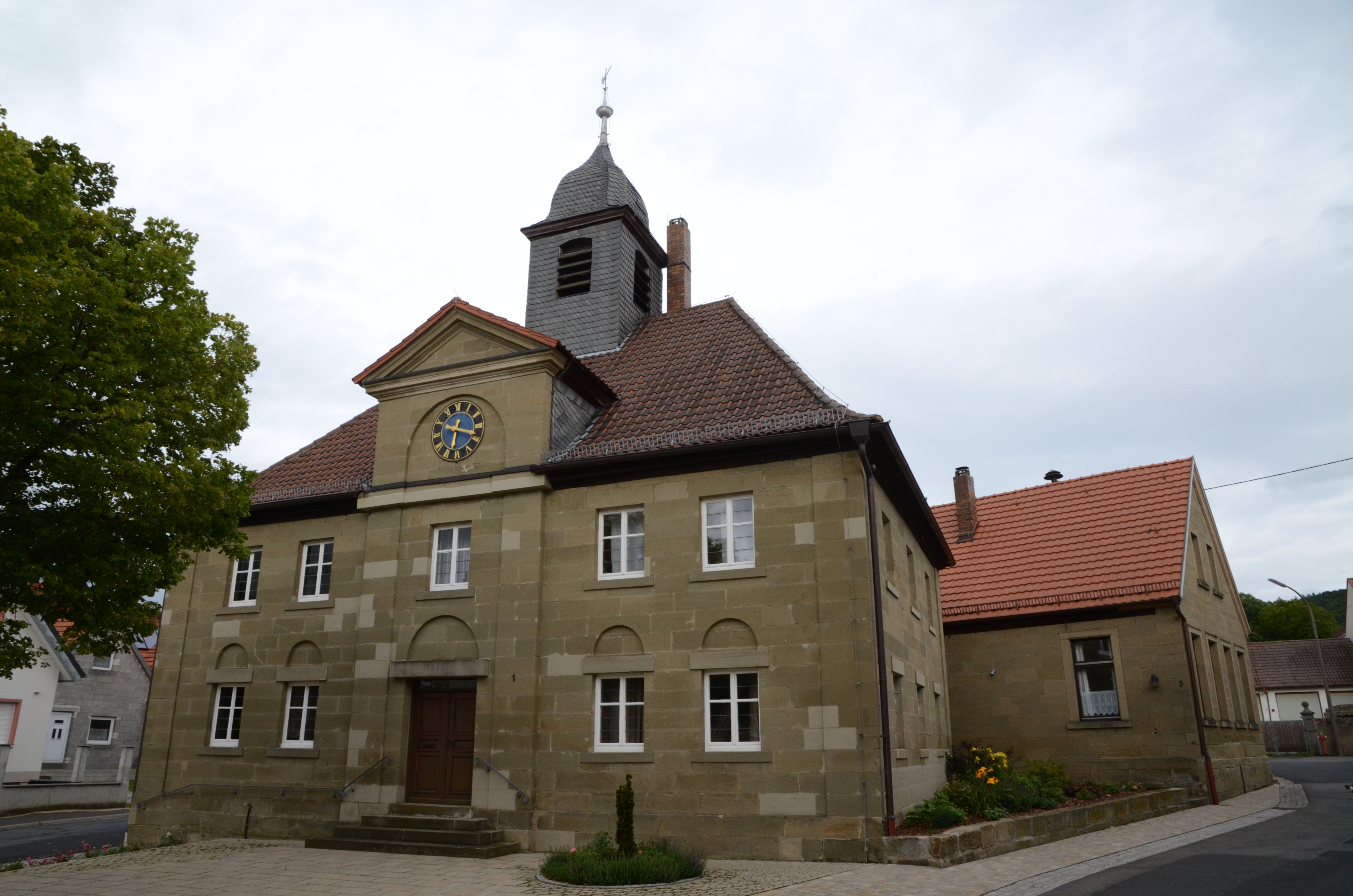 Evangelische Kirche in Greut